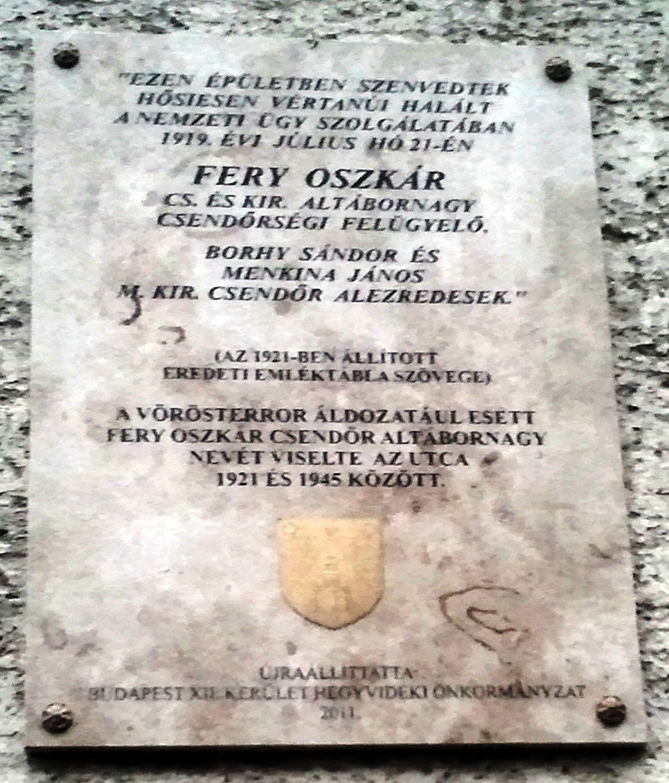 Fery Oszkár emléktáblája. Budapest XII. kerület Kiss János altábornagy utca 40. Felirata: „Ezen épületben szenvedtek hősiesen vértanúi halált a nemzeti ügy szolgálatában 1919. évi július hó 21-én Fery Oszkár cs. és kir. altábornagy csendőrségi felügyelő. Borhy Sándor és Menkina János m. kir. csendőr alezredesek.” (Az 1921-ben állított emléktábla szövege) A vörösterror áldozatául esett Fery Oszkár csendőr altábornagy nevét viselte az utca 1921 és 1945 között. Újraállíttatta Budapest XII. Kerület Hegyvidéki Önkormányzat 2011. A kő táblán fémből az önkormányzat címere is megtalálható.